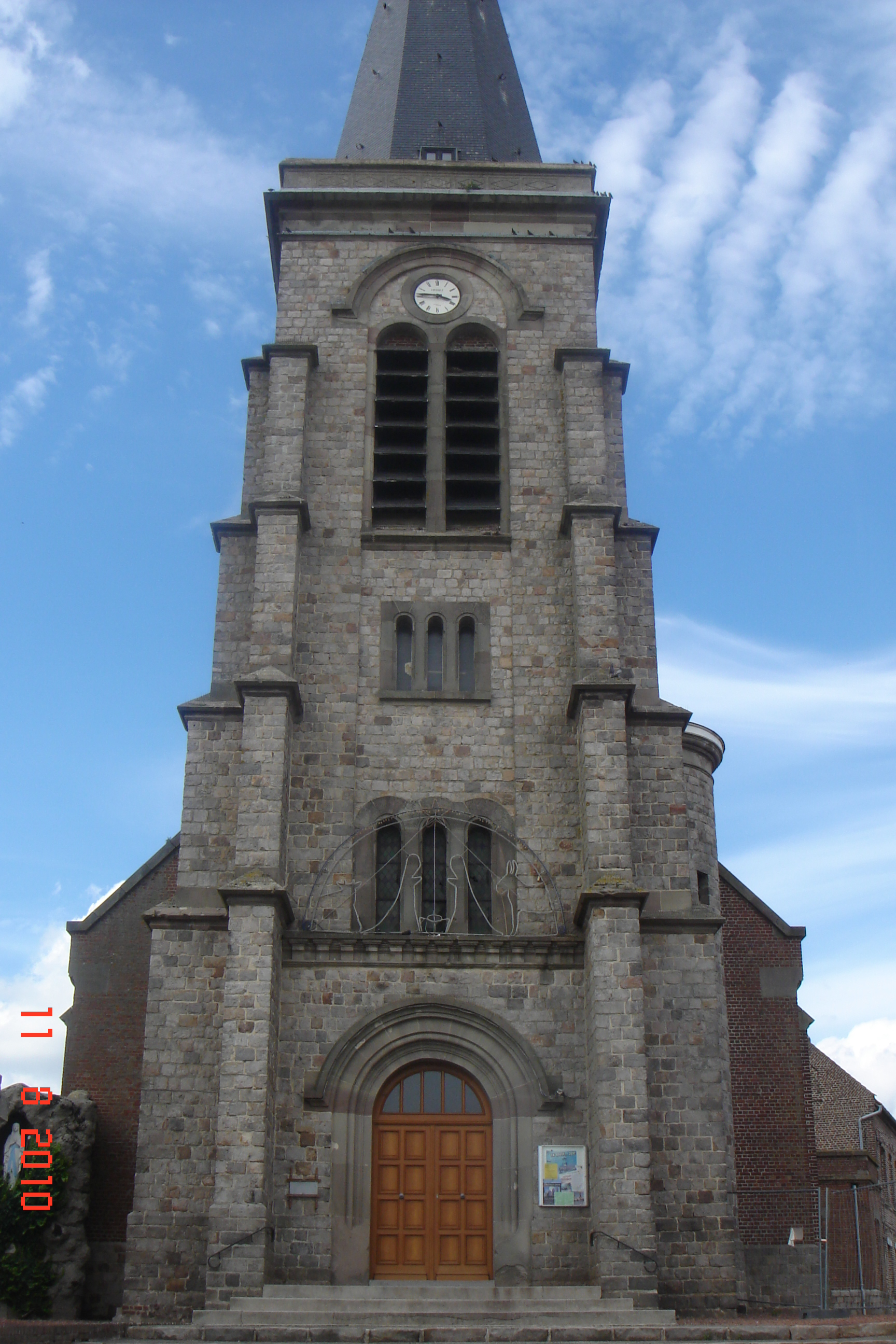 Église de Fressain